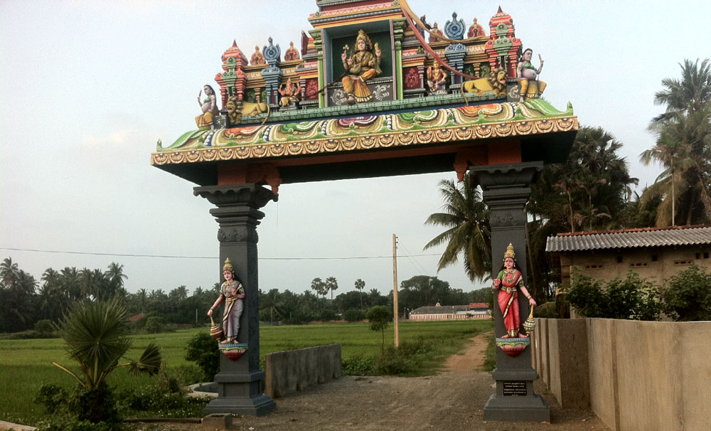 வெளிவயல் ஶ்ரீ முத்துமாரியம்மன் ஆலயத்தின் முகப்பில் அமைந்துள்ள வளைவு.